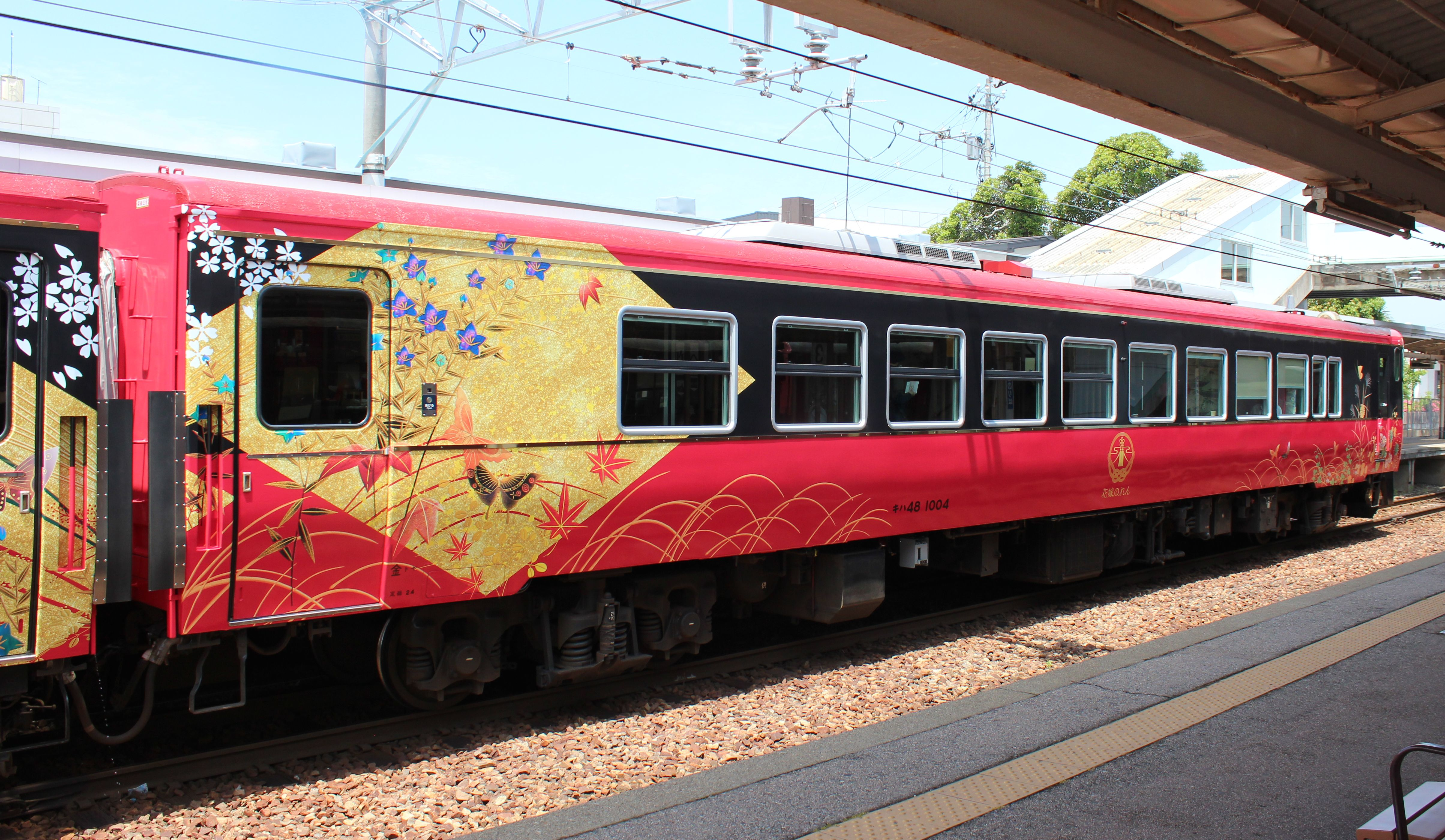 JR西日本キハ48系 七尾線ja:花嫁のれん_(列車) 羽咋駅で撮影